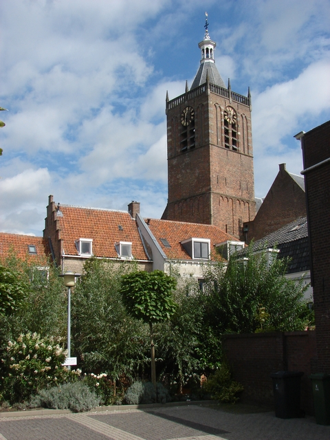 Kerk van Vianen, Church of Vianen